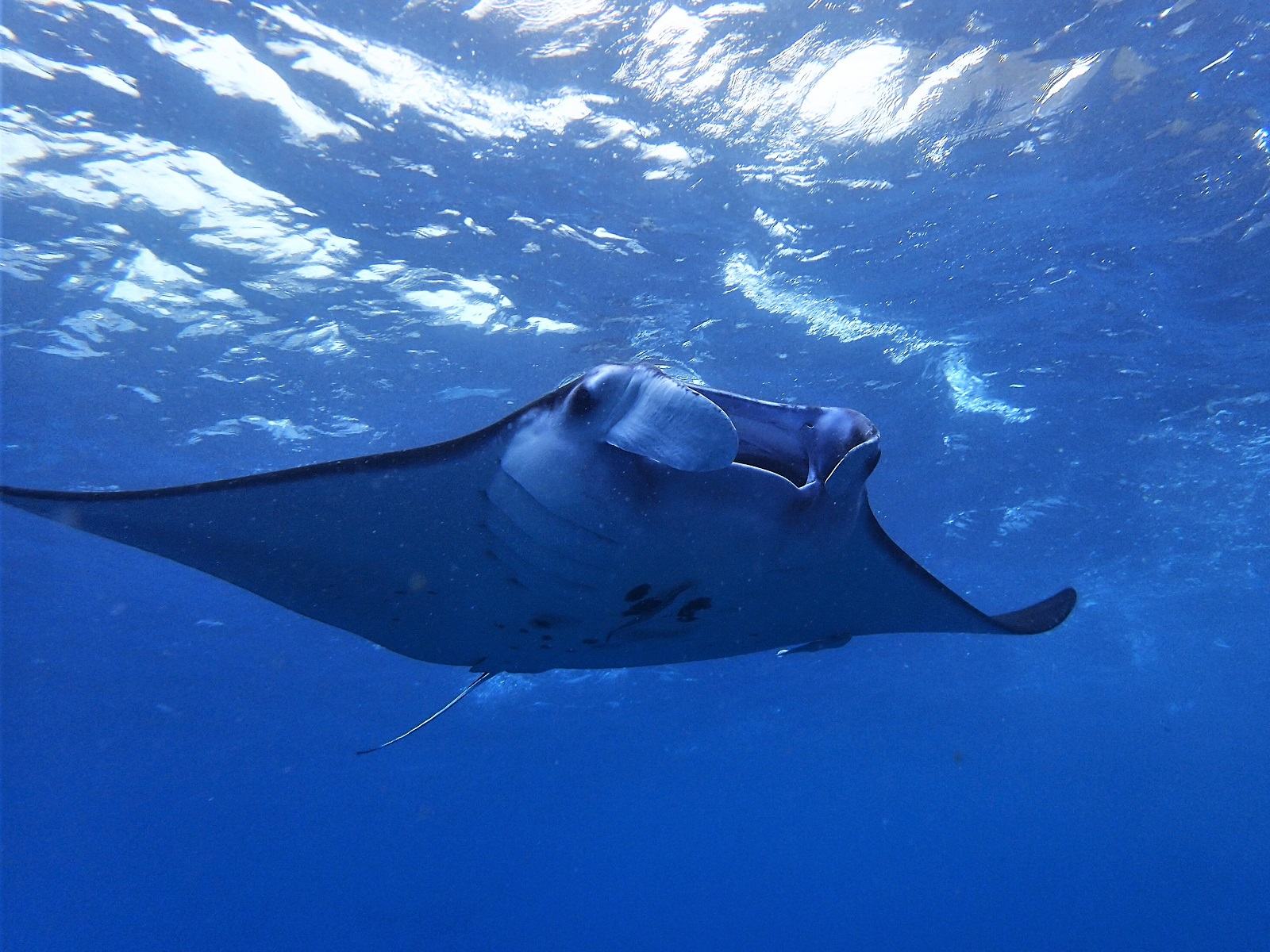 ペニダ島のマンタシュノーケリング